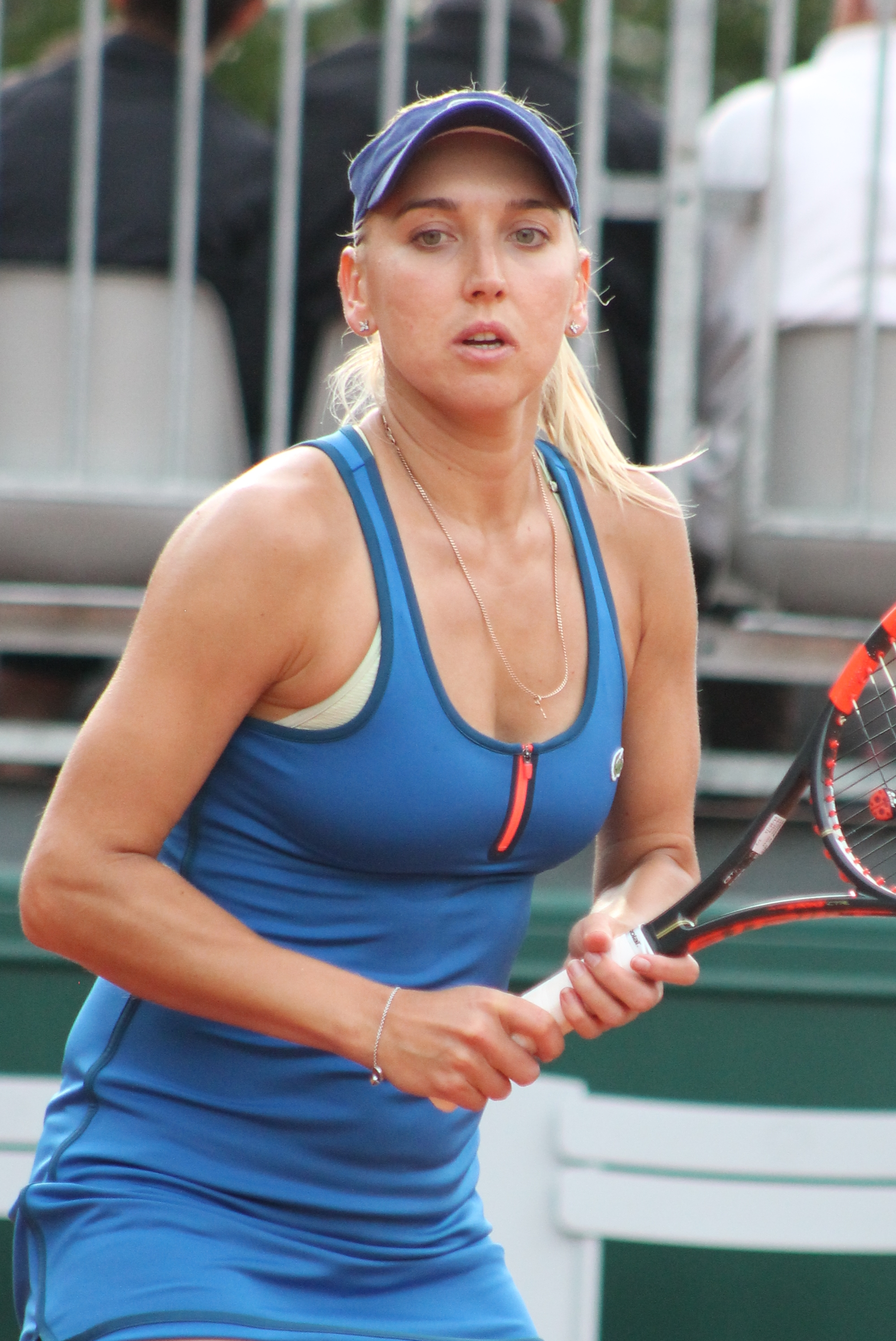 Vesnina RG15 (18)